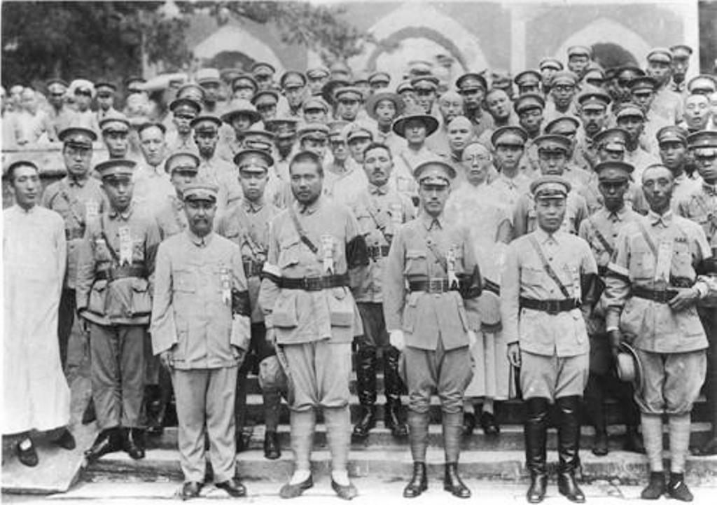 1928年7月6日，北伐军各路总司令、各路总指挥祭灵大典在北平西山碧云寺举行，蒋介石主祭。这是各路军总司令祭陵后合影。前排自右到左：鹿钟麟、李宗仁、蒋介石、冯玉祥、阎锡山。